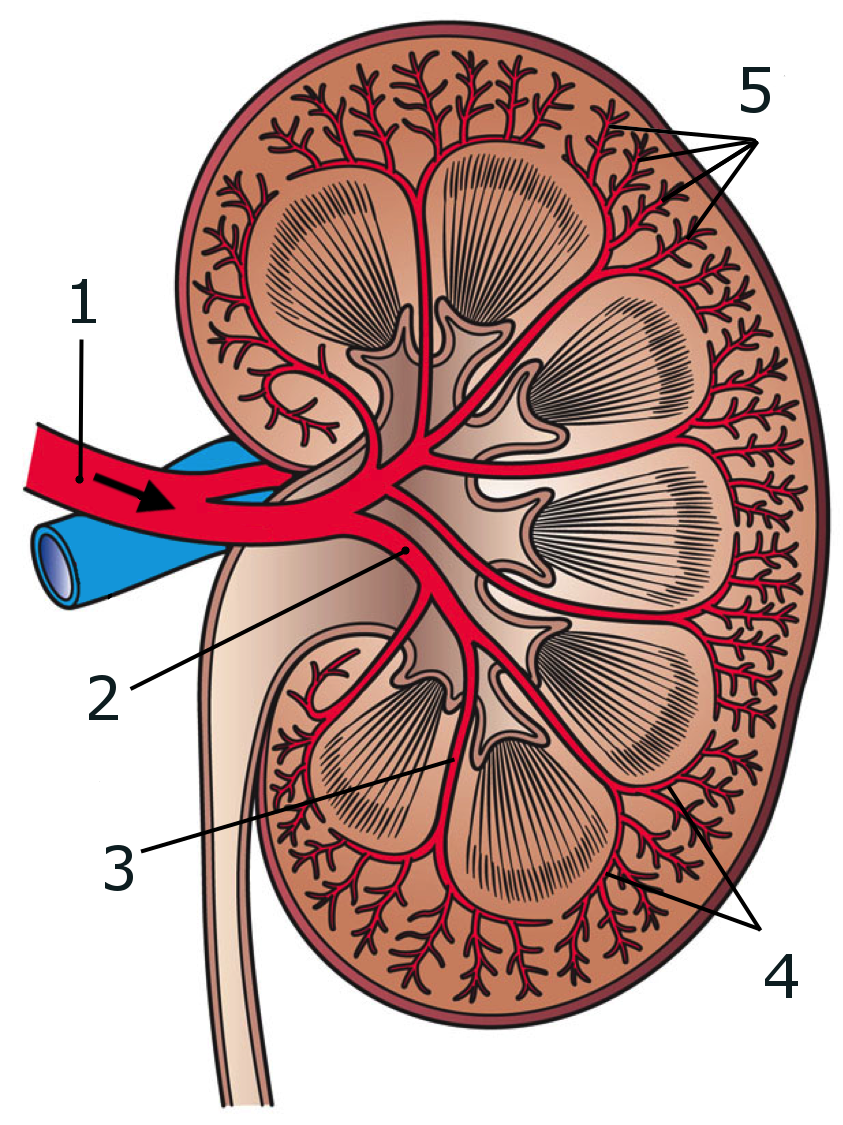 Sección del riñón que muestra la circulación arterial del órgano: 1. Arteria renal. 2. Arteria segmentaria. 3. Arteria interlobular 4. Arteria arciforme renal 5. Arteria interlobulillar